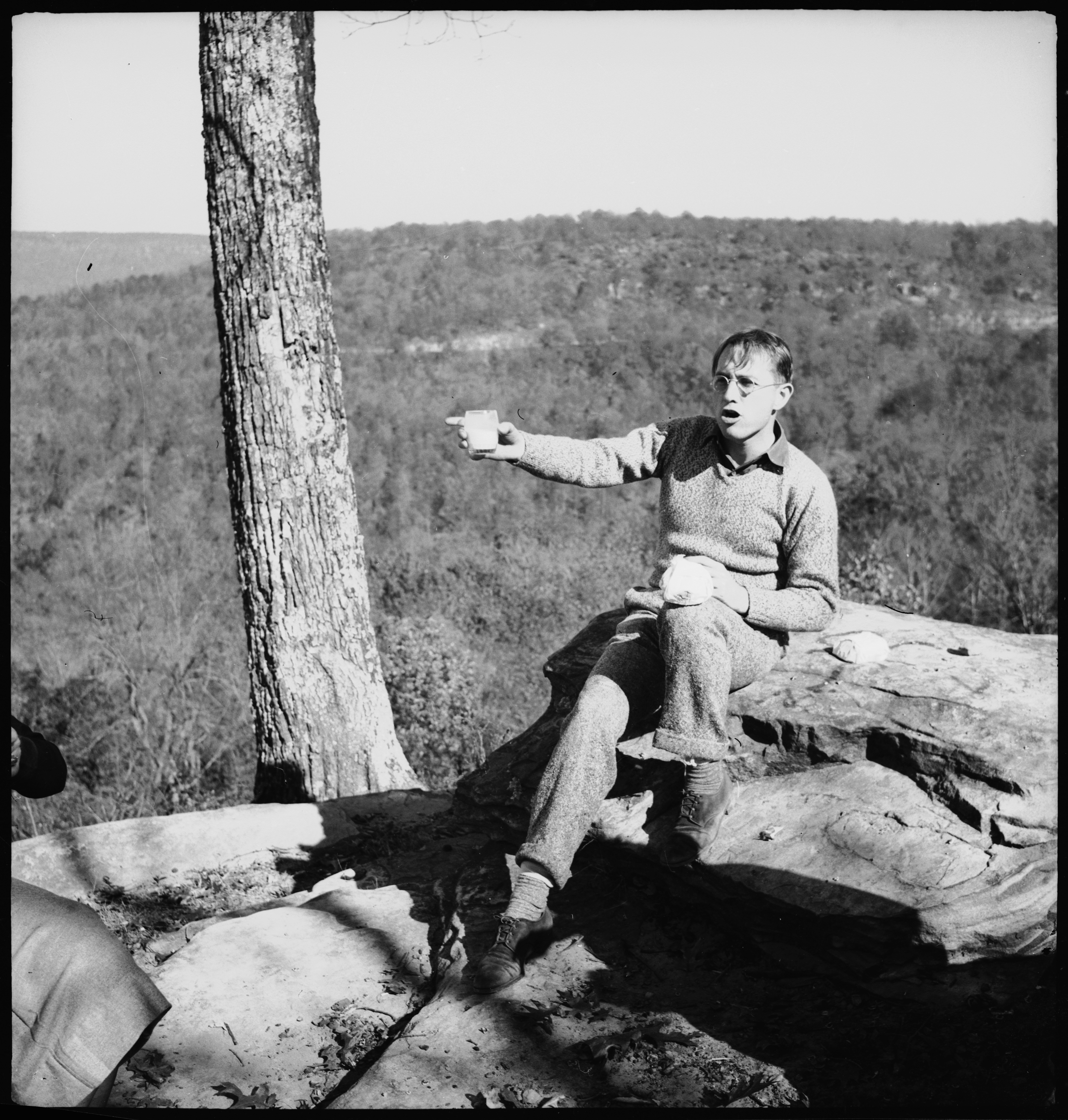 USA, Monteagle/TN: Highlander Folk School; Myles Horton sitzend auf einem Felsen